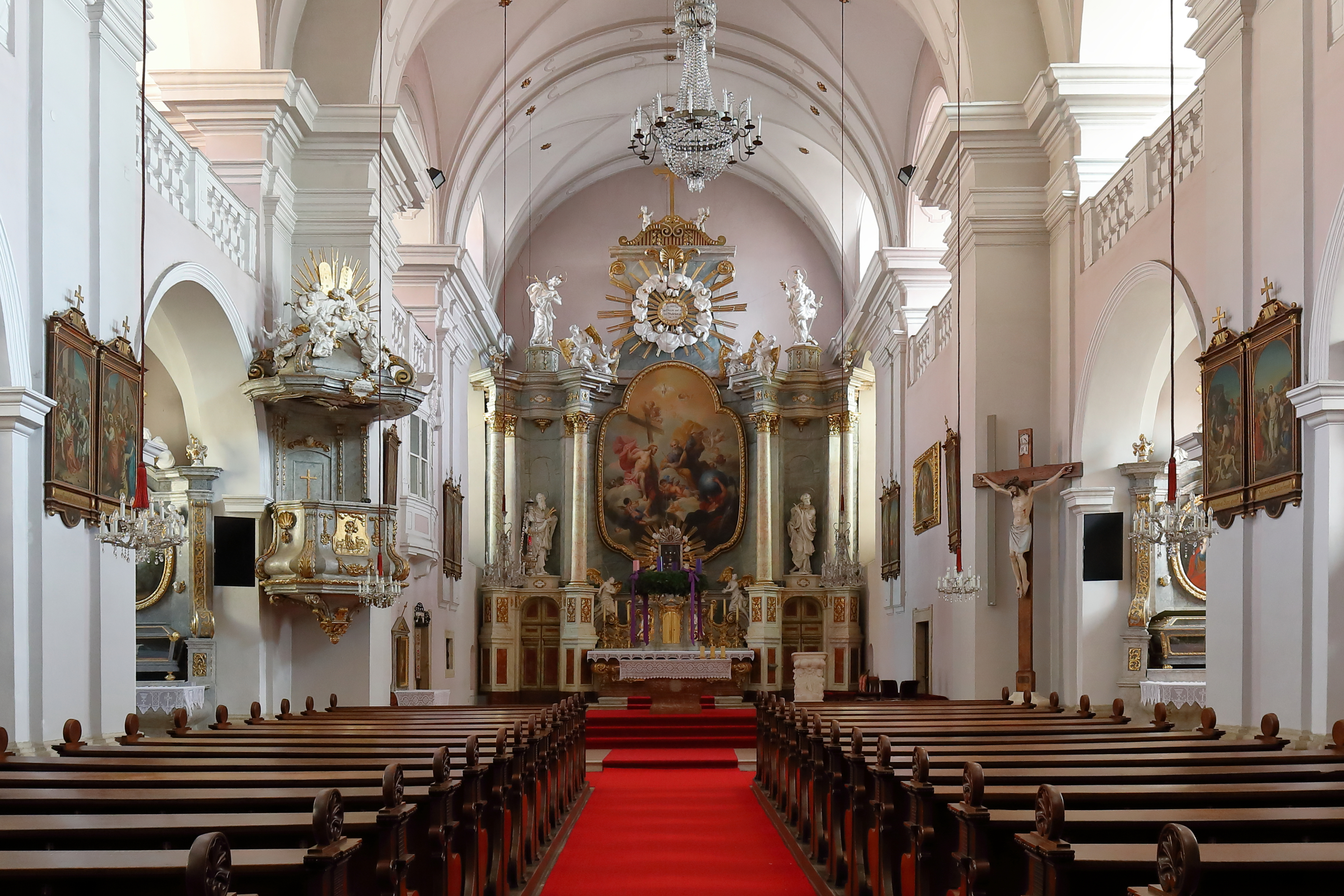 Innenansicht Richtung Hochaltar der röm.-kath. Pfarrkirche hl. Dreifaltigkeit in der niederösterreichischen Stadtgemeinde Bruck an der Leitha.Die Kirche wurde von 1696 bis 1702 unter Einbeziehung des Stadtturmes errichtet. Von 1738 bis 1740 erfolgte ein Umbau des Kirch/Stadtturmes und der schmucklosen Stirnfront der Kirche. Die Einrichtung stammt vorwiegend aus der 2. Hälfte des 18. Jahrhunderts.